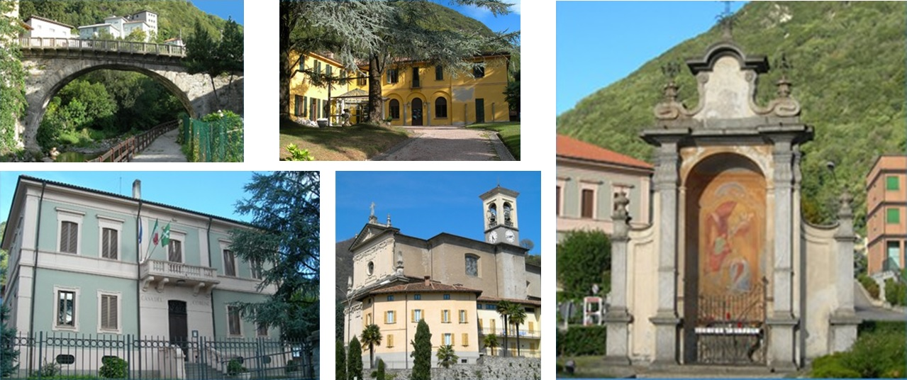 foto collage di Ponte Lambro